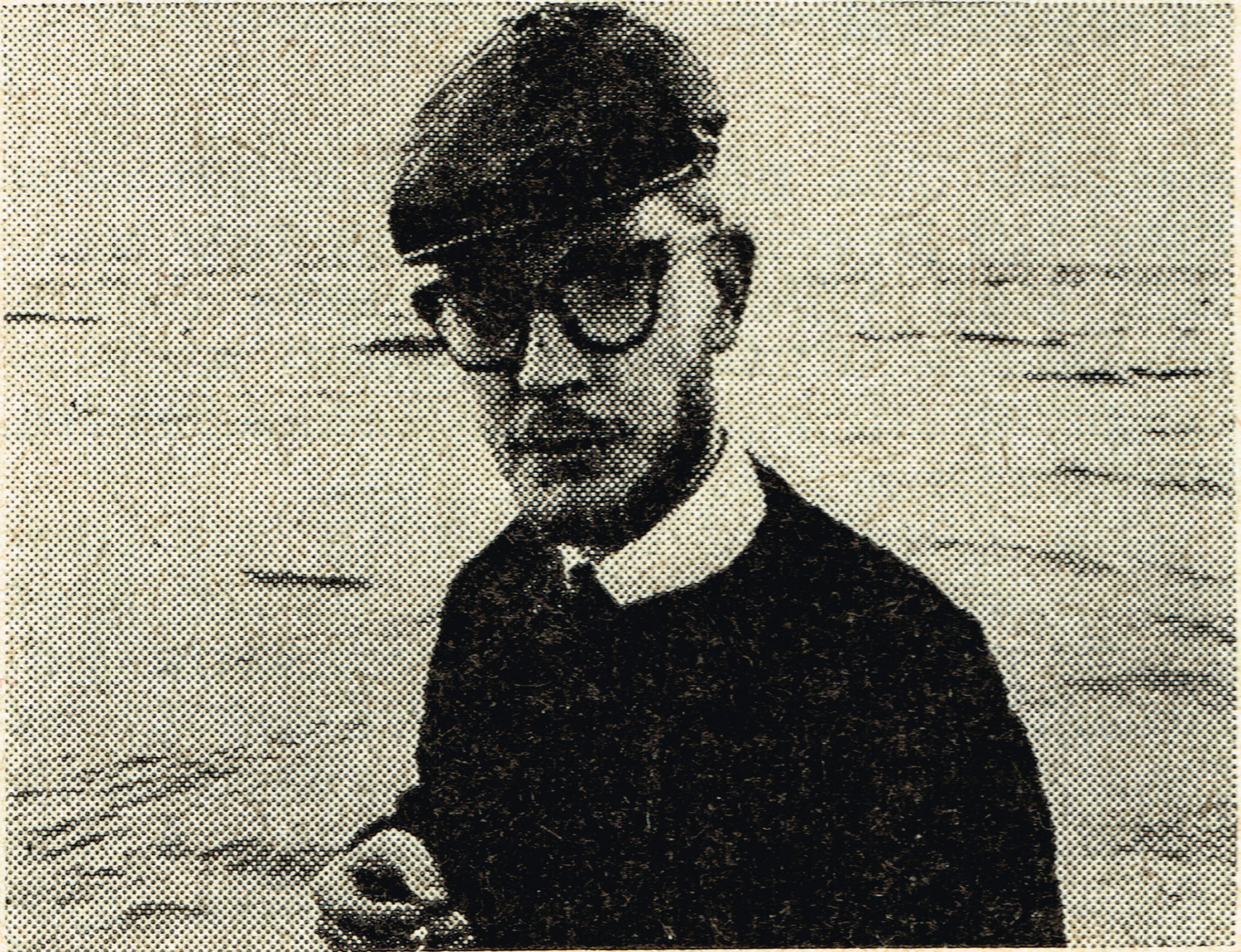 Jan Hemmel.